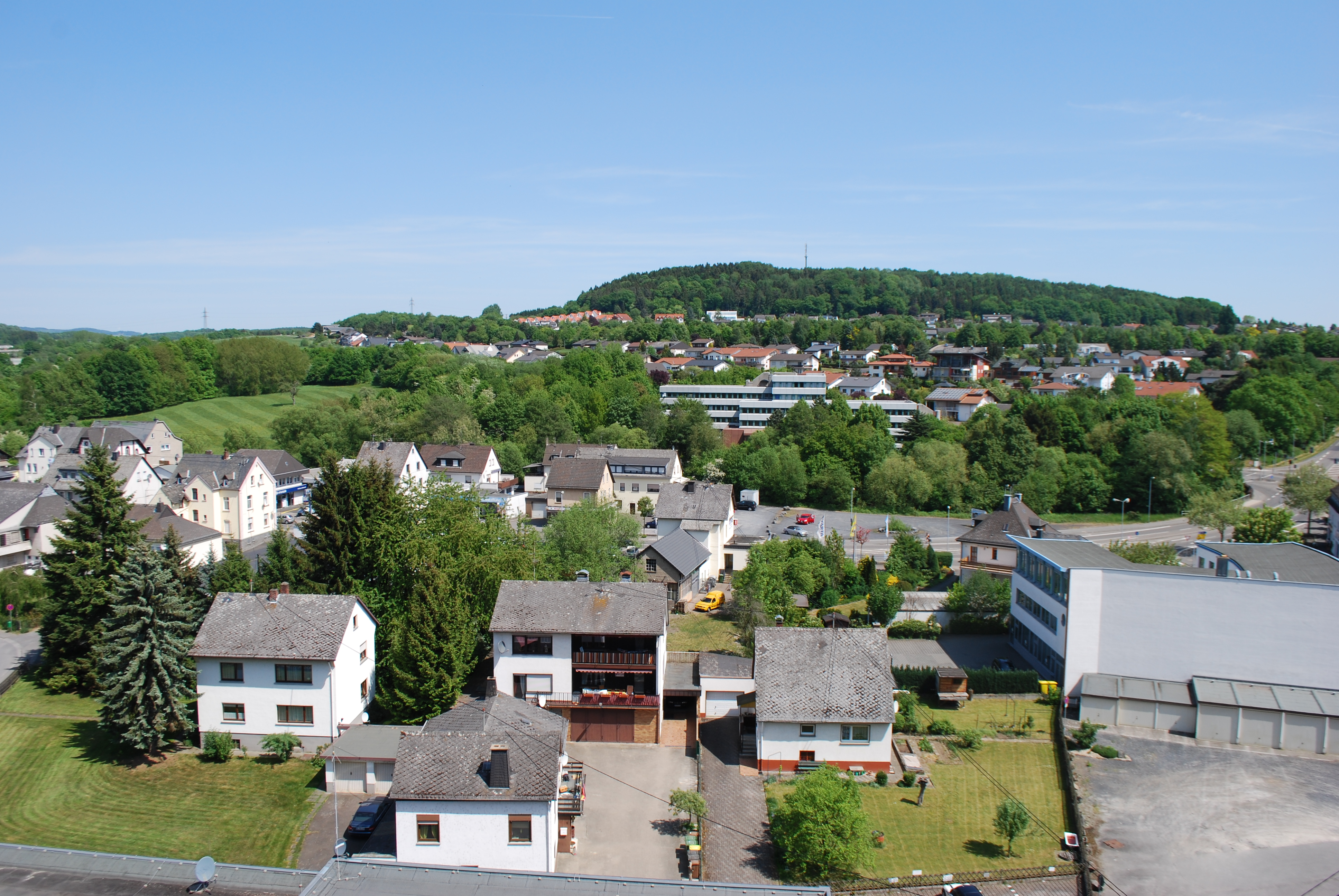 Vue sur la ville basse, depuis Judengasse.